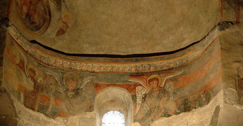 Abadia de Santa Maria d'Arles. Pintures murals. Vallespir, França